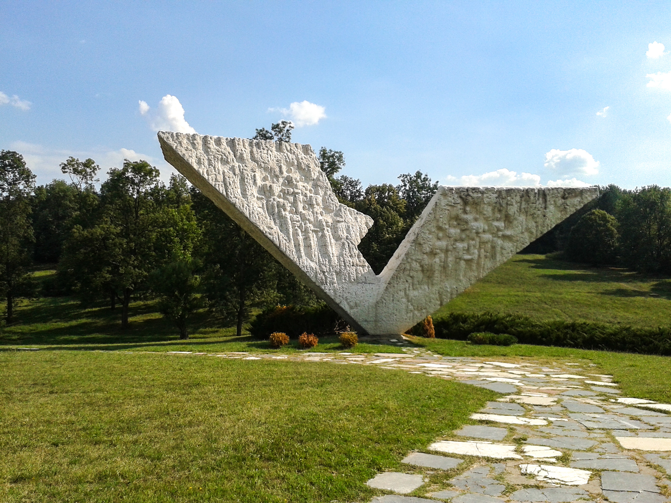 Спомен парк „Крагујевачки октобар“ у Шумарицама